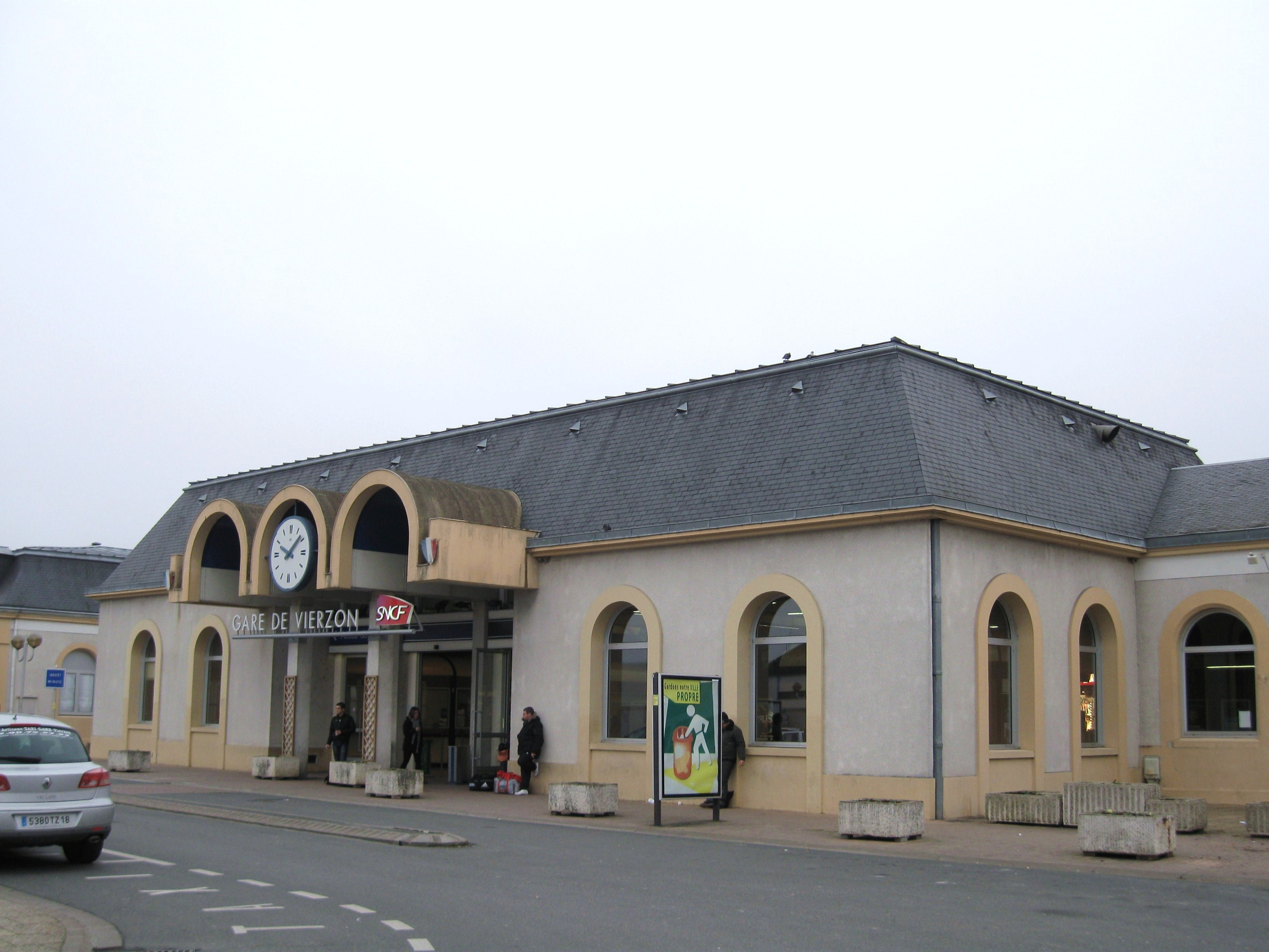 Façade extérieure de la gare de Vierzon-Ville, Vierzon, Cher, France